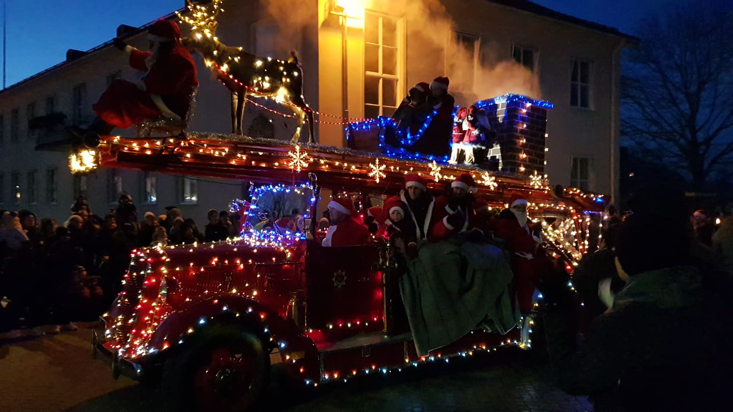 Tomtebrandbilen – 1937 års modell med tomten sittande i rensläde på taket. Foto: Moa Widéll